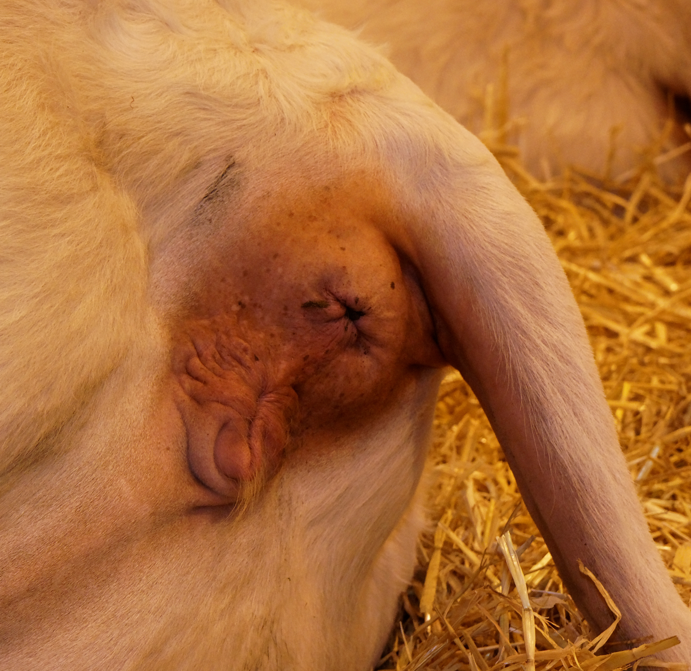 Le salon de l'agriculture de Paris en 2011.